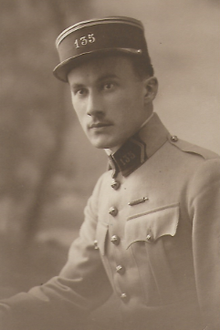 Cliché de 1919, lieutenant au 135e régiment d'artillerie lourde.